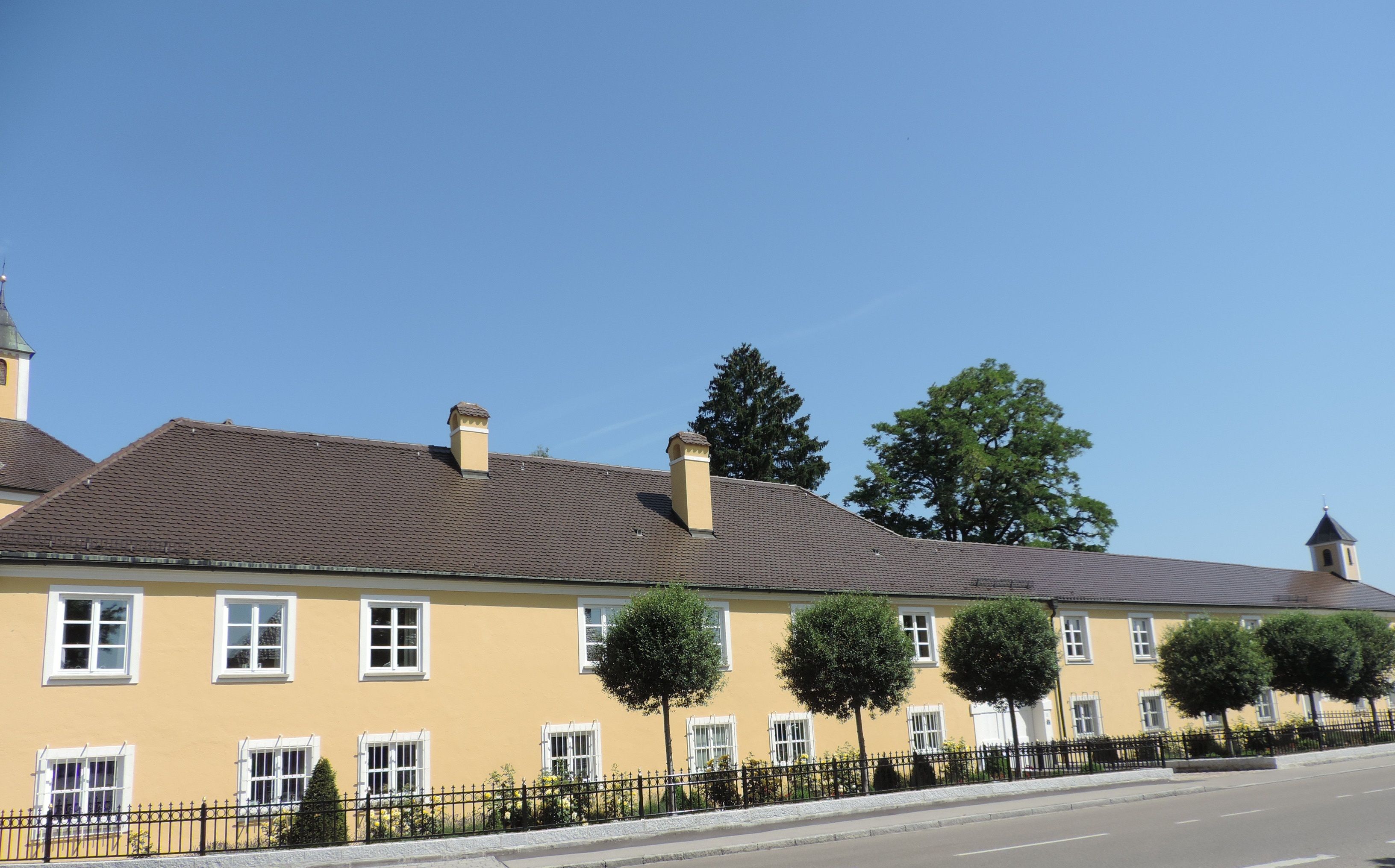 Schloss Nordendorf